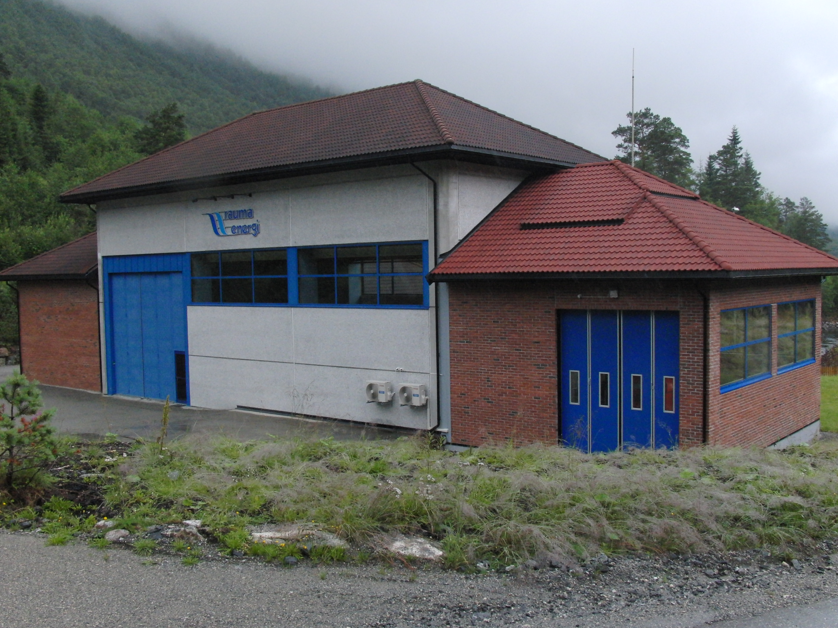 Berild kraftverk